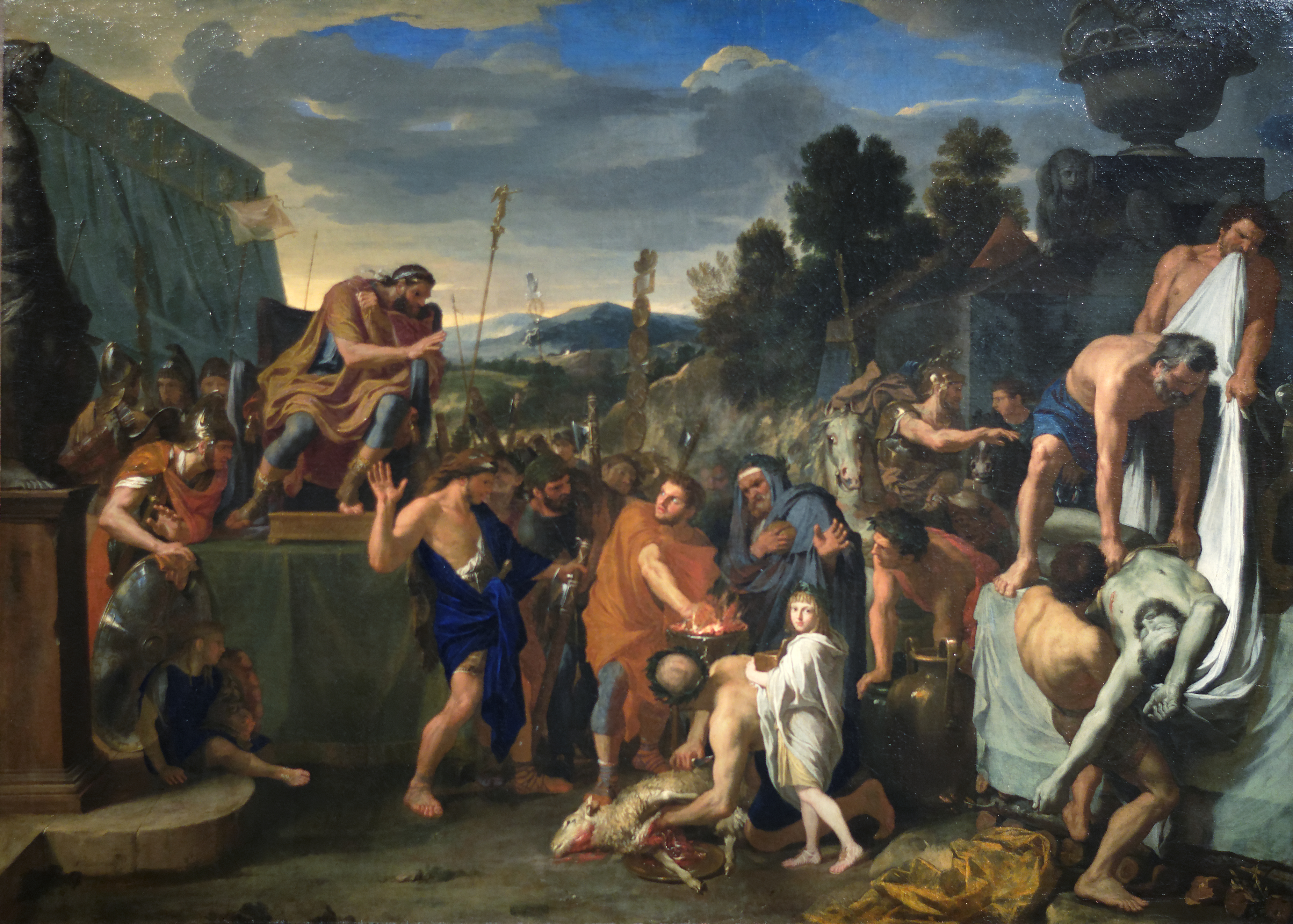 Mucius Scaevola devant Porsenna. Huile sur toile (95 x 133) de Charles Le Brun exposée au Musée des Ursulines de Mâcon. Inv A 390. Dépôt de l'Etat 1896